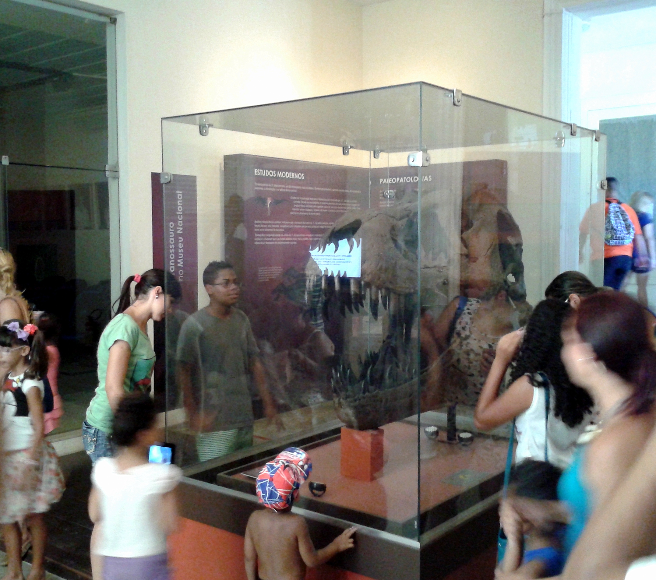 Português do Brasil: Visitantes observam o crânio de um Tiranossauro rex (dito "Stênio") da coleção do Museu Nacional/UFRJ, Rio de Janeiro.